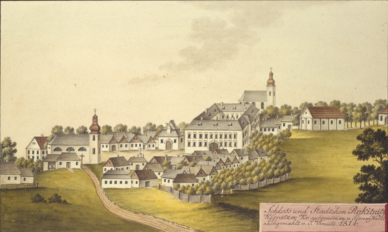 Rokytnice v Orlických horách. Schloss und Staedtchen Rokitnitz Kggraetzer Kr. aufgenommen v. Florenz Warti nachgemahlt v. J. Venuto 1814